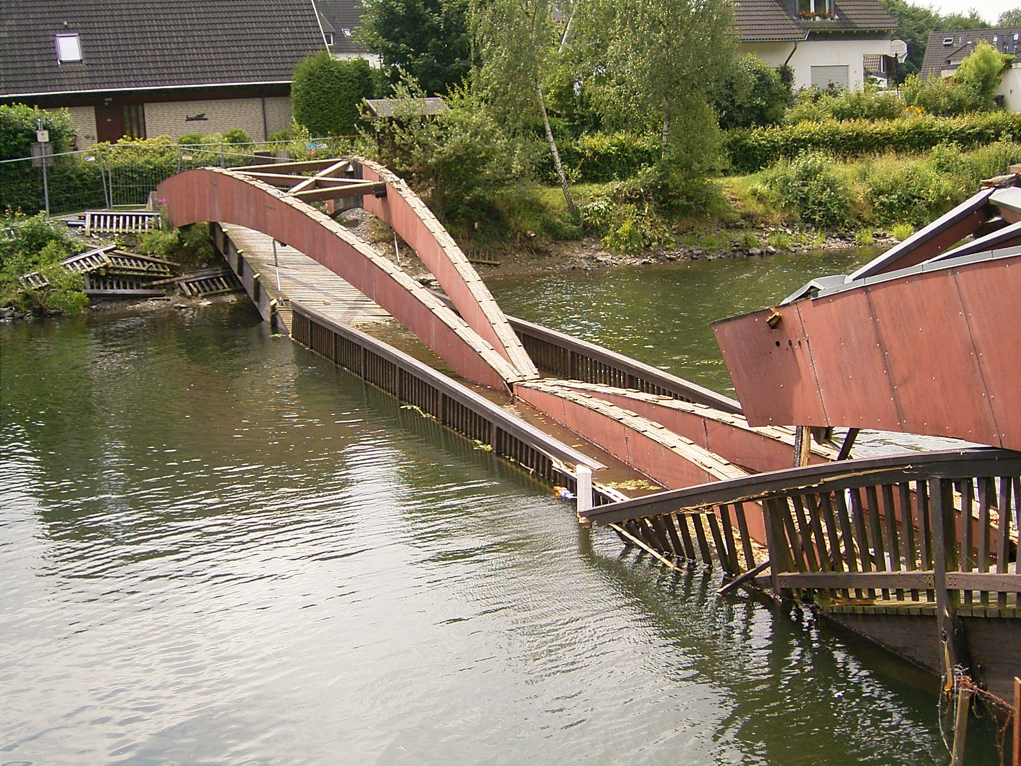 Ernst-Müller-Brücke in Hückeswagen nach dem Zusammenbruch am 24.06.08